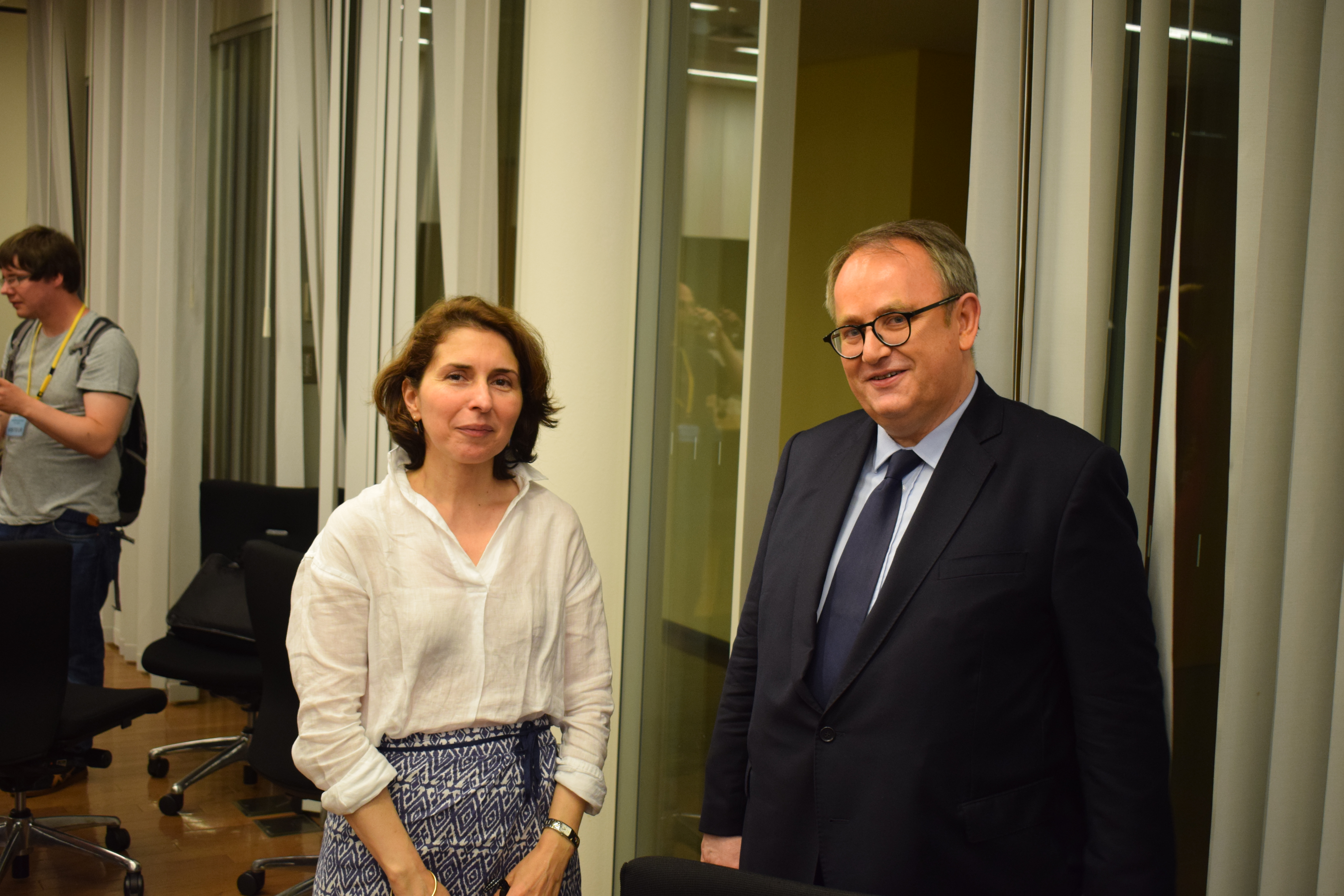 Marie-Hélène Teylouni, Consule de France au Japon, et Jean-Yves Leconte, Sénateur des Français établis hors de France, à l'apéritif de bienvenue organisé par l'association Français du Monde (ADFE Tokyo)